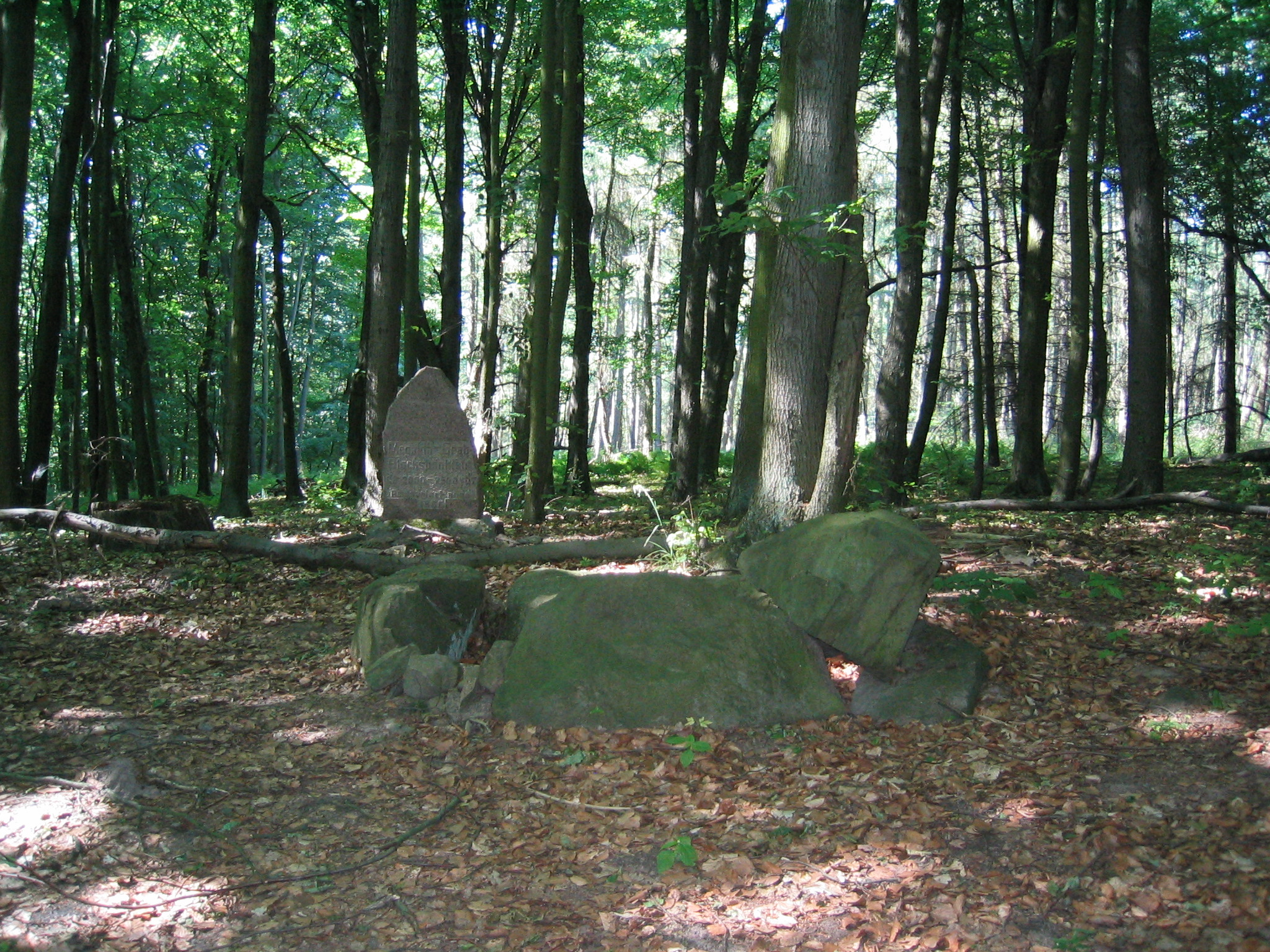 Blocksteinkistengrab auf dem Zimmerberg in der Uckermark. (Nähe BAB11 - Abfahrt Warnitz)